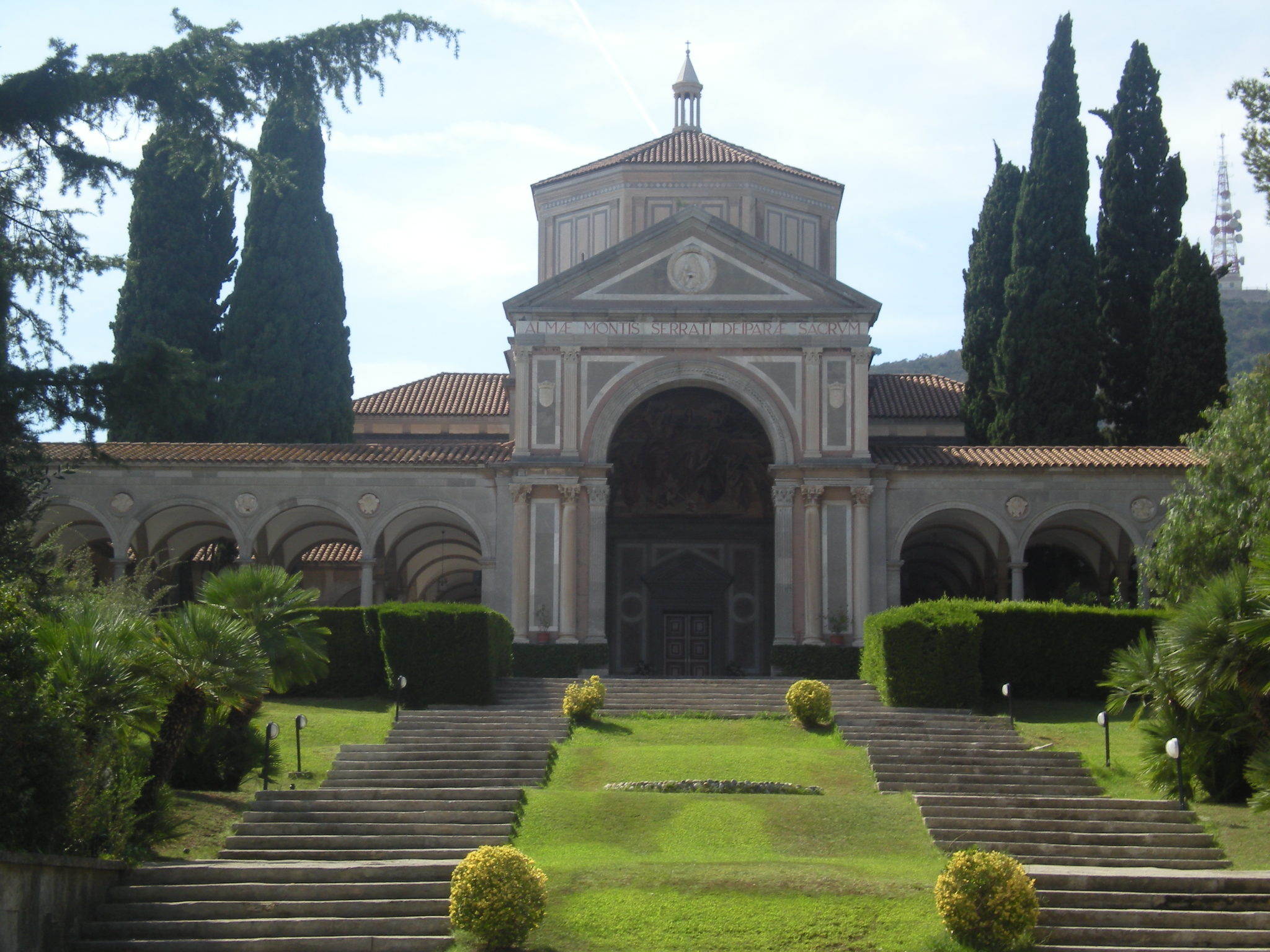 Parròquia de Santa Maria Reina (Barcelona)